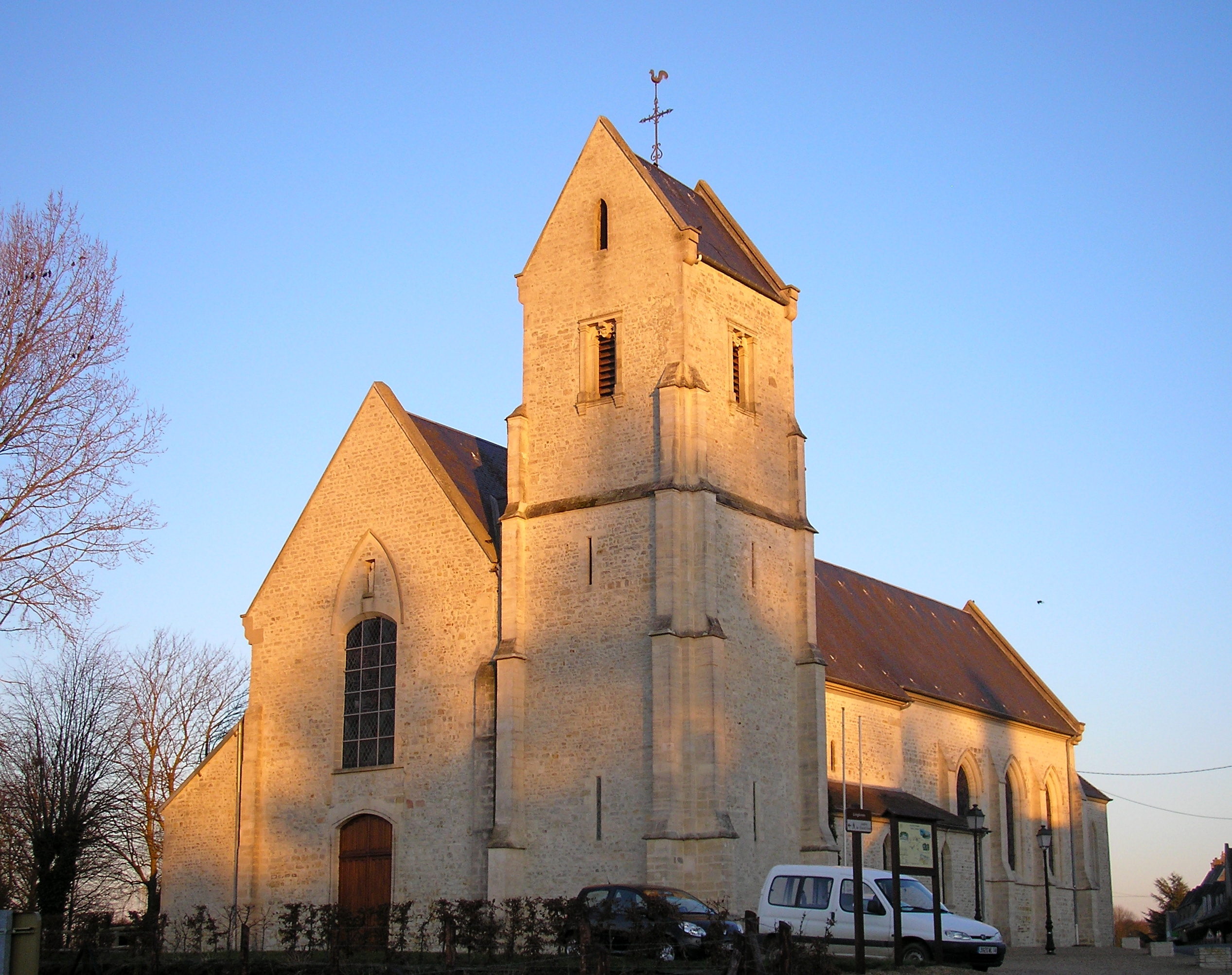 Lingèvres (Normandie, France). L'église Saint-Martin.